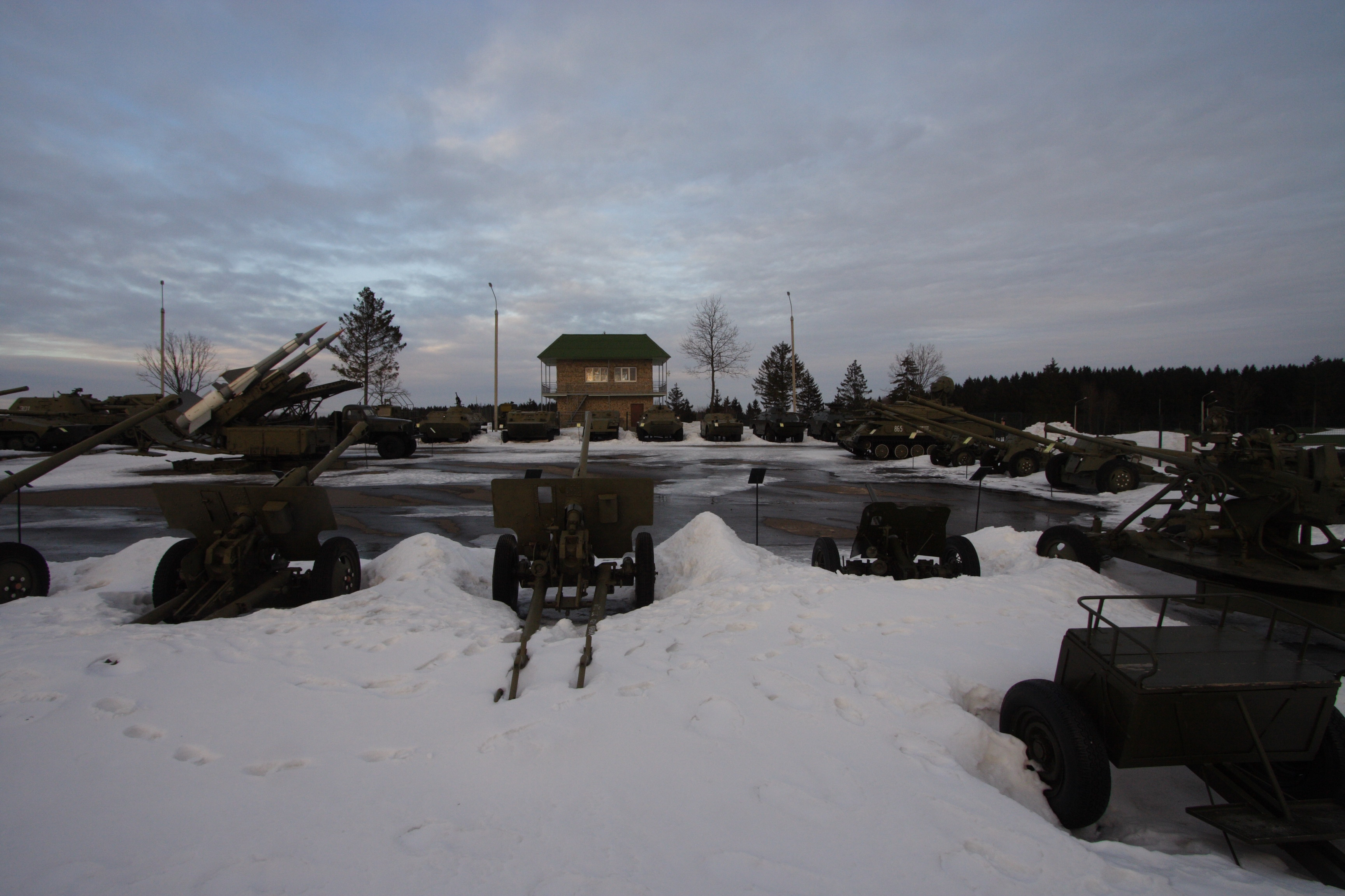 Stalin line - exposition